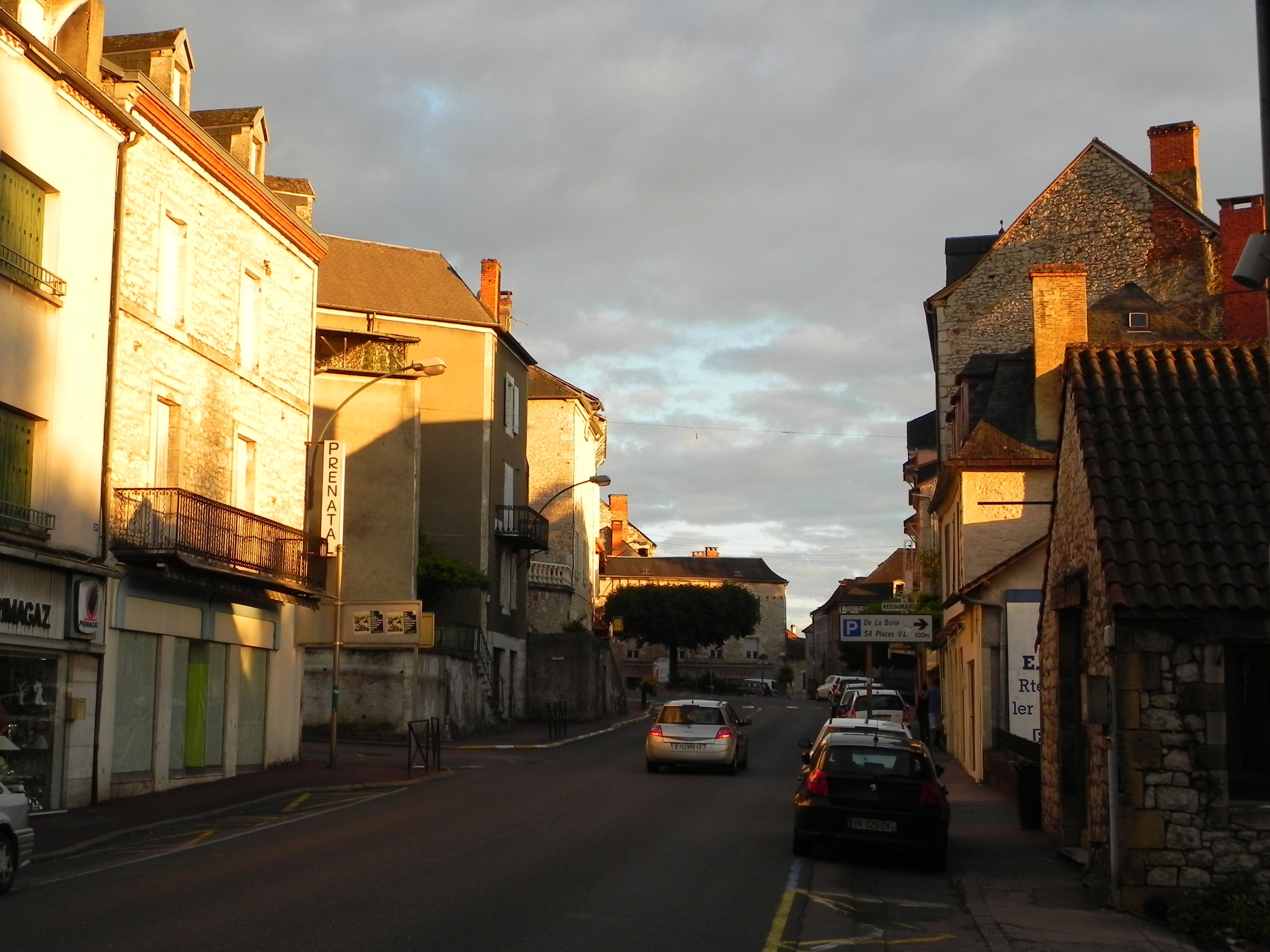 Souillac , Au cœur de la vallée de la Dordogne, le Pays de Souillac vous ouvre les portes du Midi